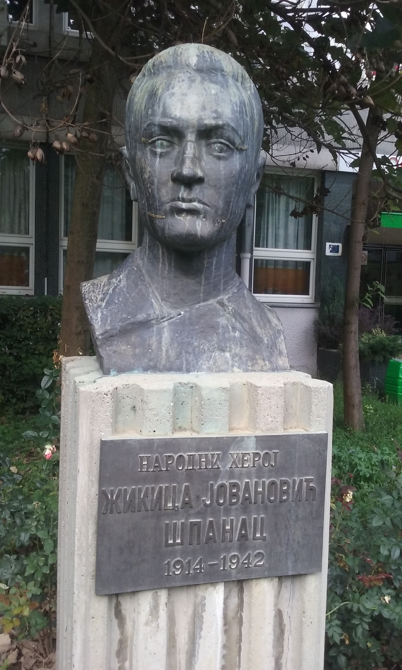 Спомен-биста Жикице Јовановића Шпанца испред основне школе "Надежда Петровић" (раније ОШ "Жикица Јовановић Шпанац") у Новом Београду.